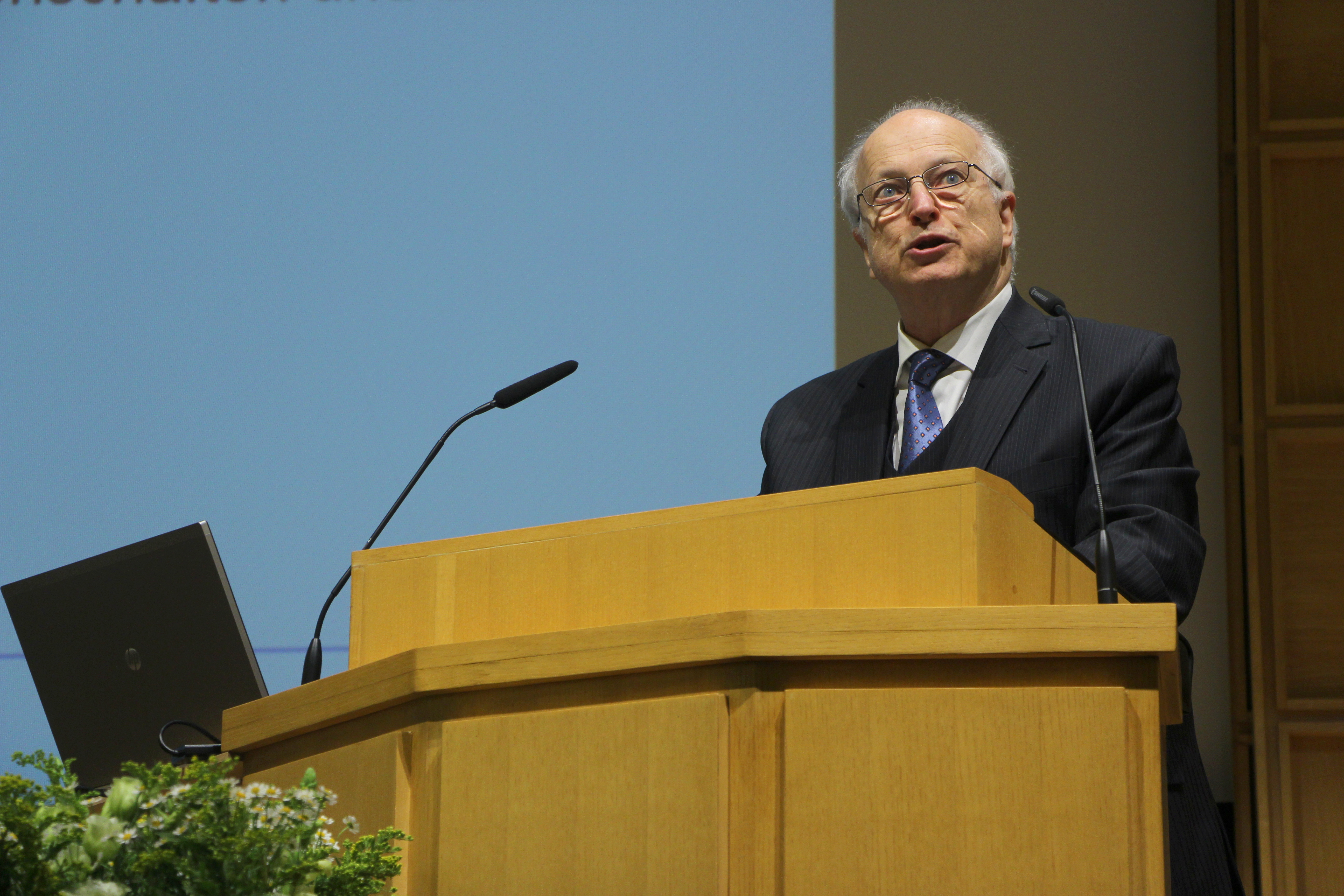 Wissenschaftsforum Universität Konstanz Gerda-Henkel-Stiftung 2015, Düsseldorf.